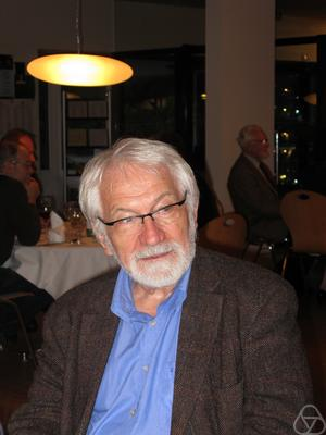 Foto di Willi Jäger